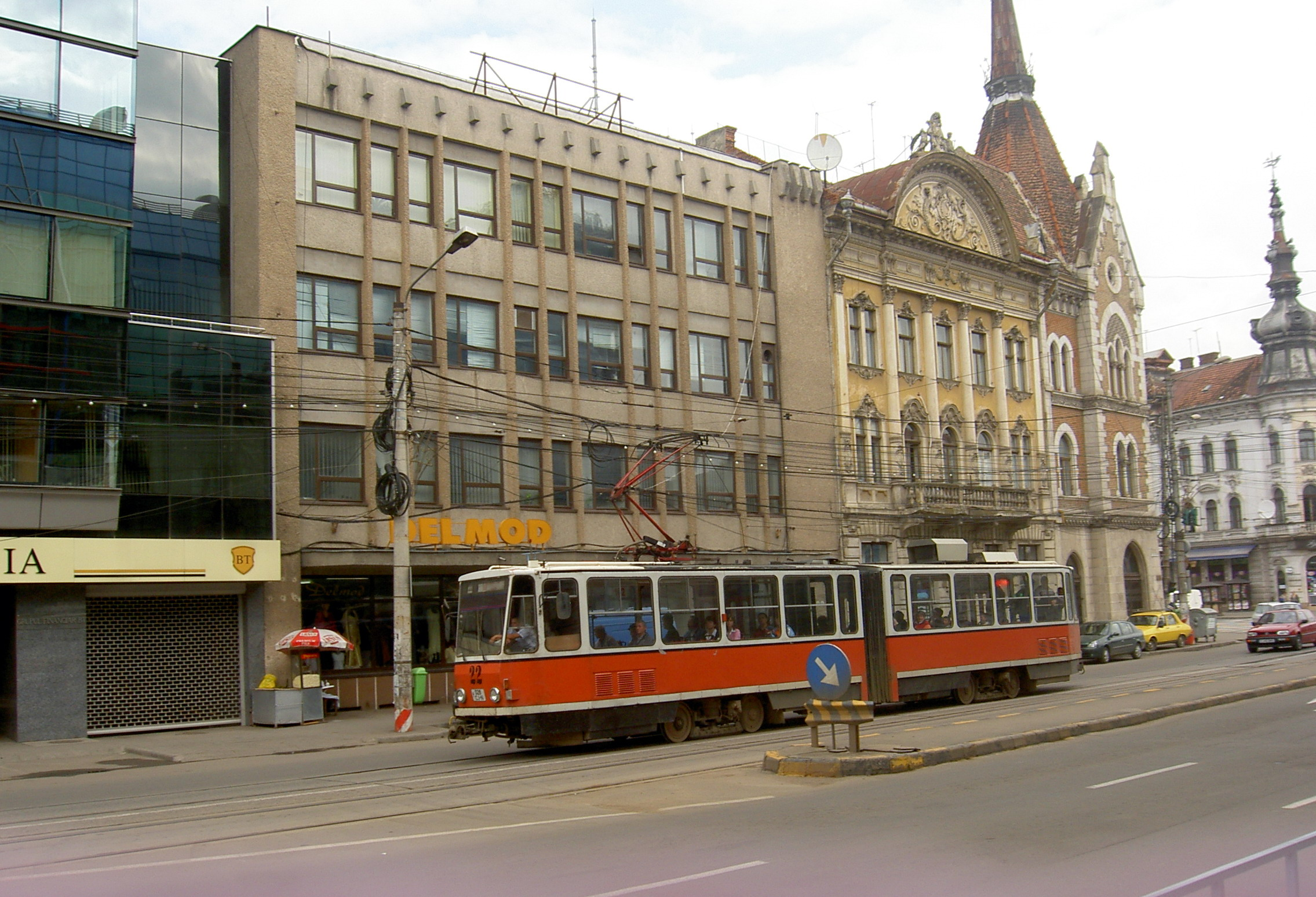 Cluj-Napoca, tramvaj